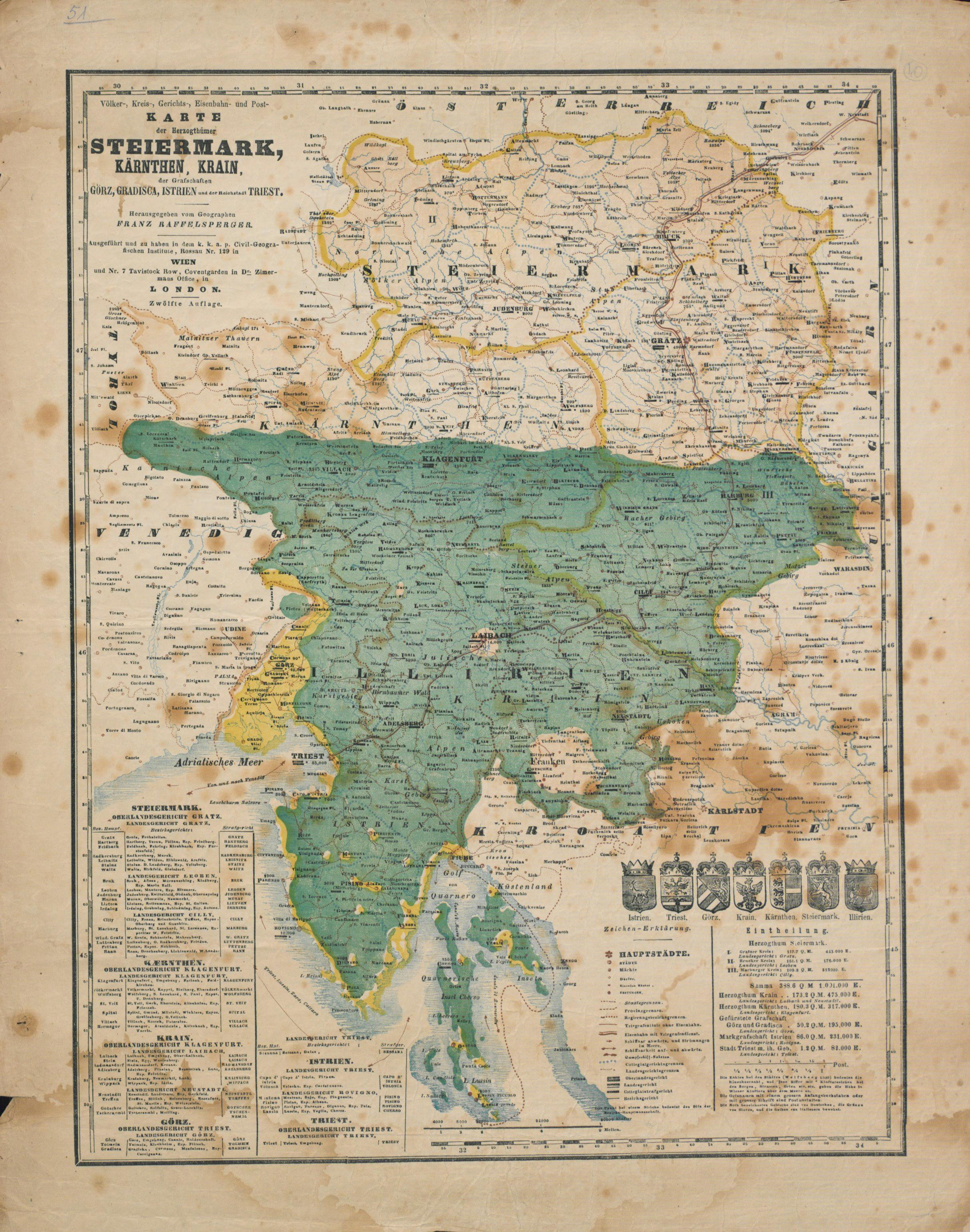 Völker-, Kreis-, Gerichts-, Eisenbahn- und Post- Karte der Herzogthümer Steiermark, Kärnthen, Krain, der Grafschaften Görz, Gradisca, Istrien und der Reichstadt Triest.